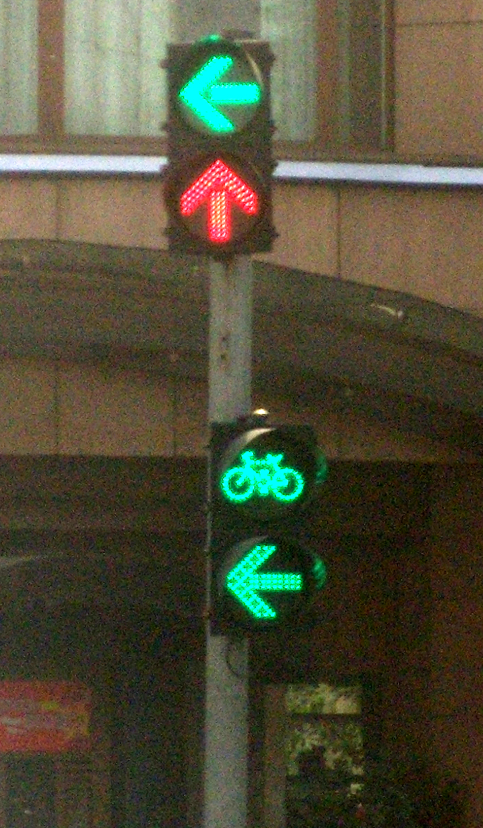 Feu tricolore de signalisation routière à changement intégral pour chaque direction et pour chaque groupe de conducteur visé. Ce sont des feux à L.E.D. La couleur change en temps voulu. Économique en place il évite la mise en place de plusieurs jeu de sémaphores.